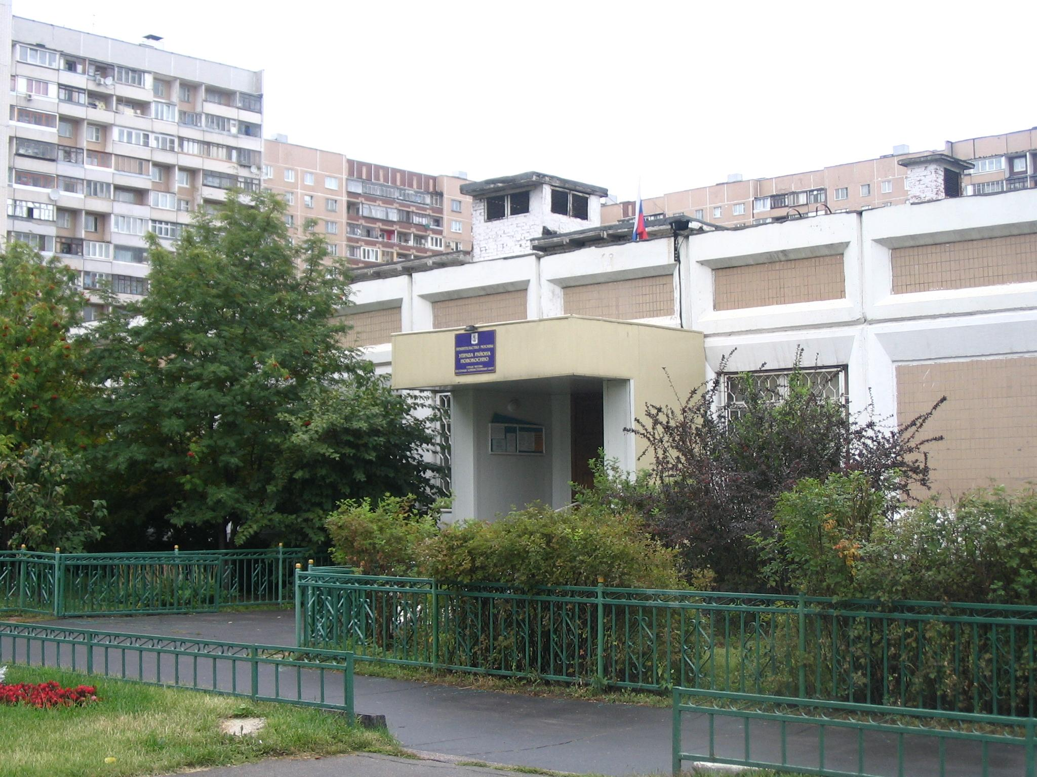 Управа района Новокосино